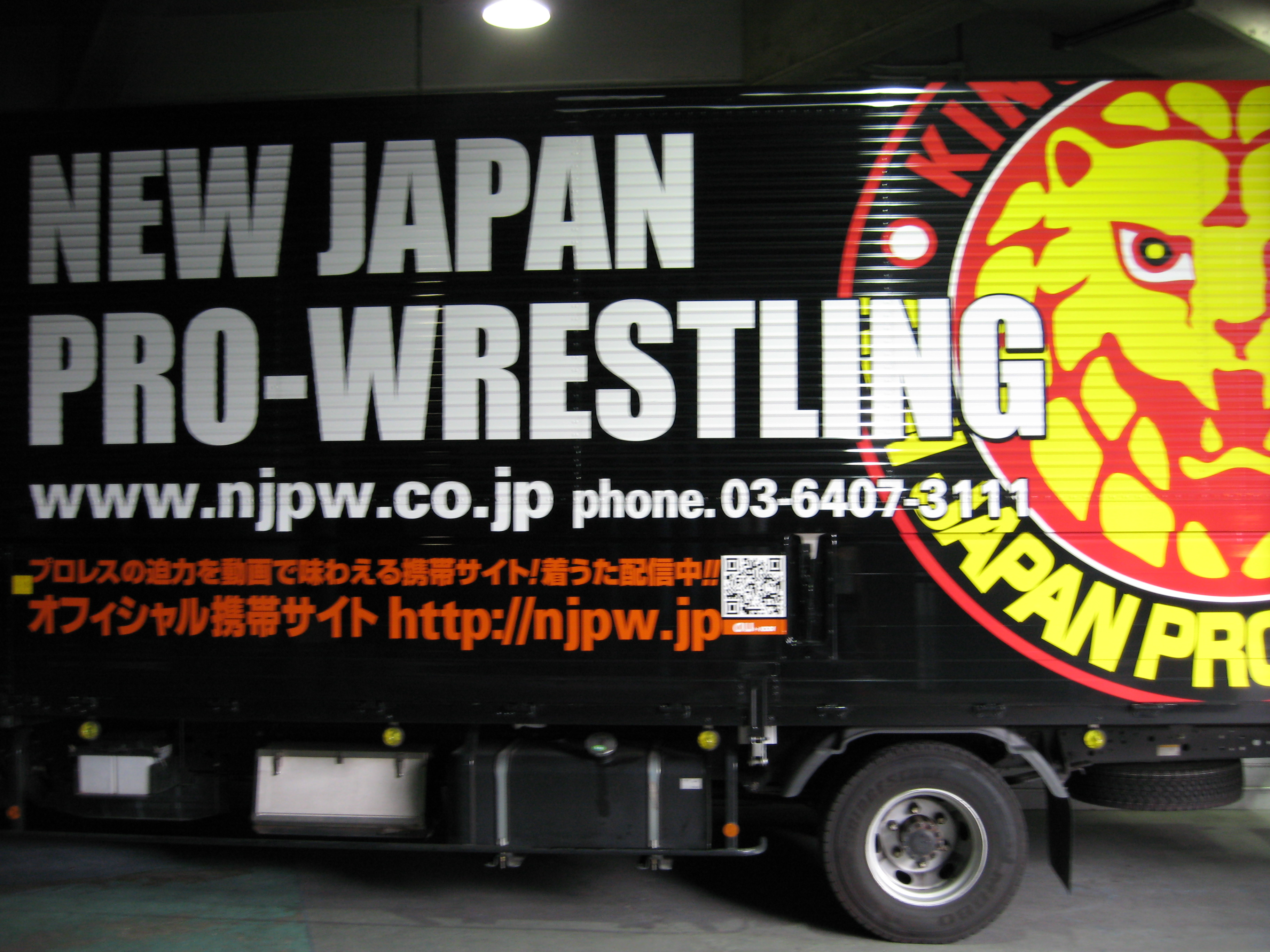 Korakuen Hall, Tokyo, Japan.